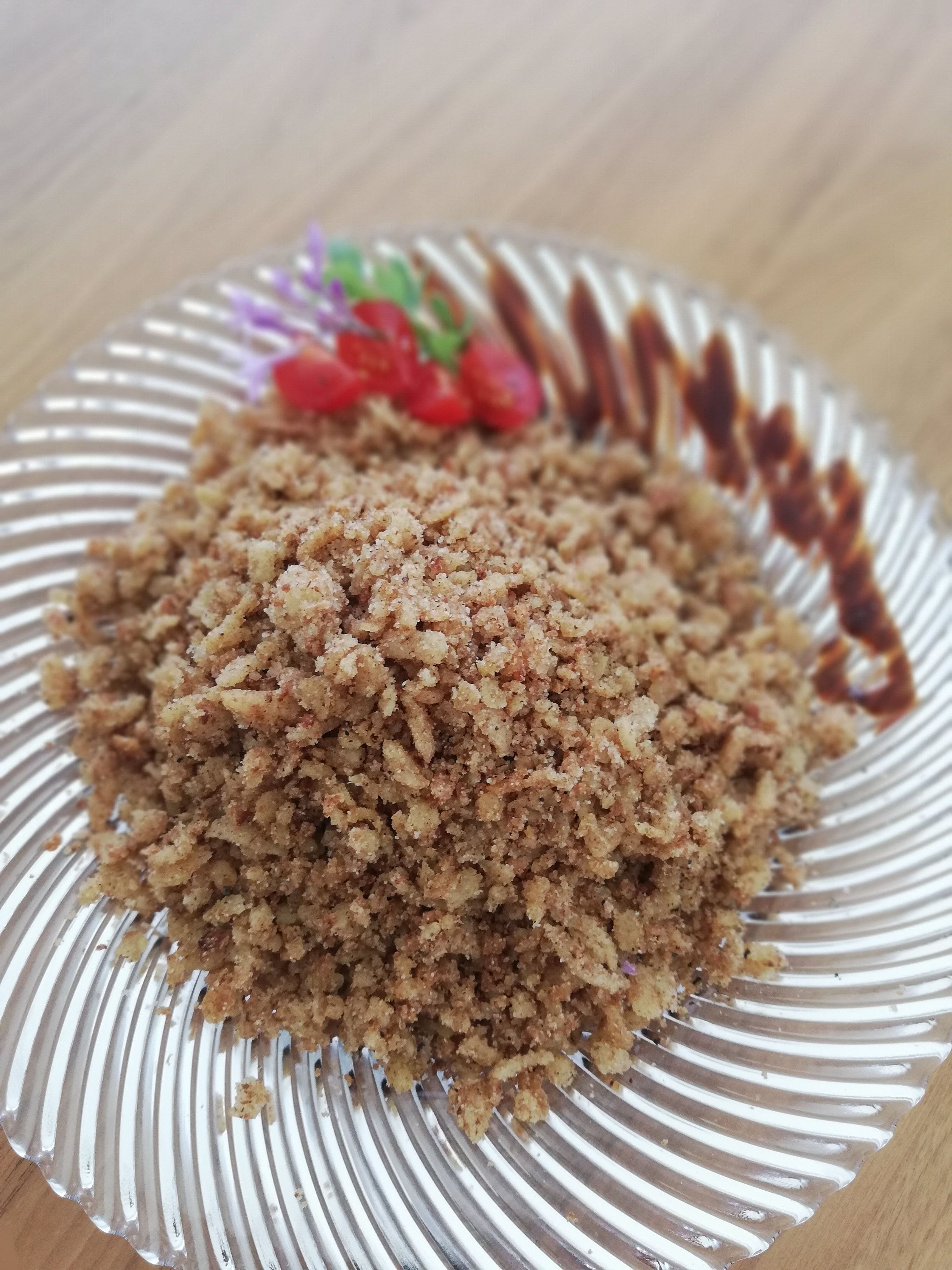 Traditionelles Tiroler Kartoffelgericht